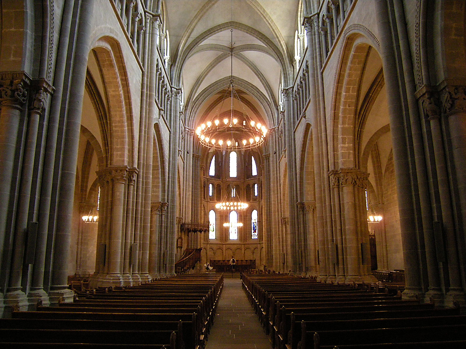 Cathédrale Saint-Pierre